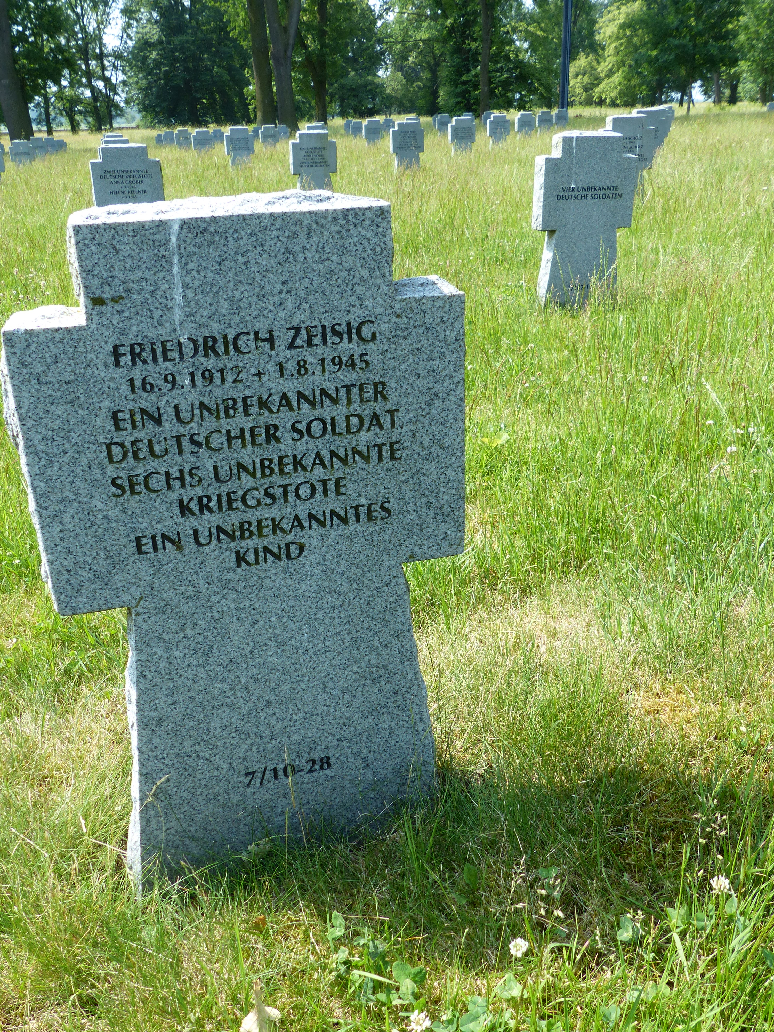 Bildeserie Kriegsgräberstätte Cheb auf dem Stadtfriedhof